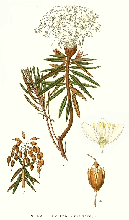 Rhododendron tomentosum Harmaja, syn. Ledum palustre L. Original Description Skvattram, Ledum palustre L.